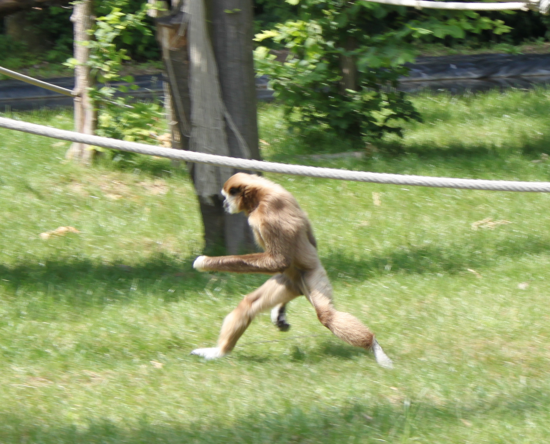 Nyíregyháza Zoo, Hylobates lar